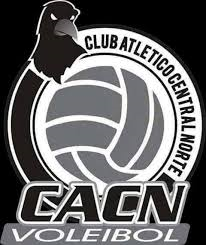 Emblema de Central Norte Vóley, equipo profesional de voleibol.